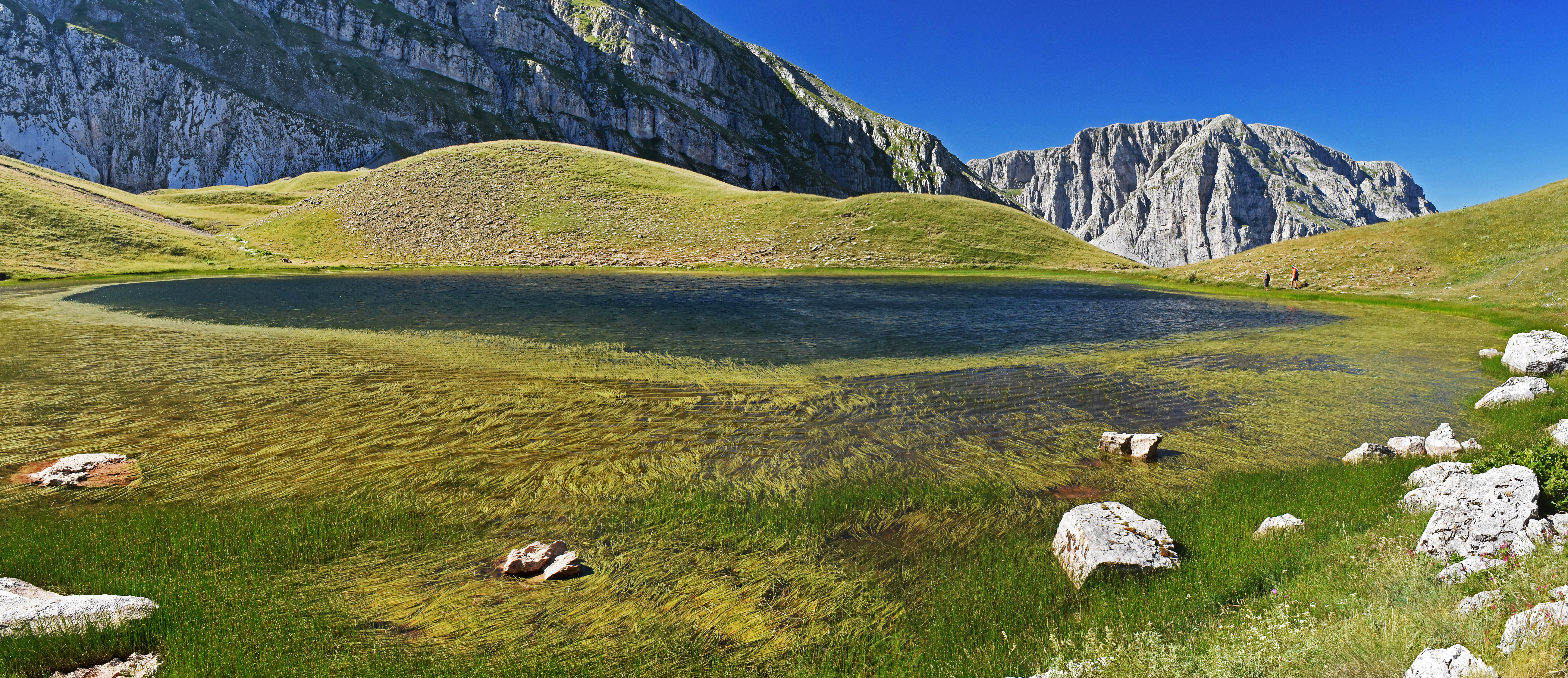 Η δρακόλιμνη που βρίσκεται σε αλπικό λιβάδι της Τύμφης, σε υψόμετρο 2.050 μ. This is a photography of Natura 2000 protected area with ID GR2130009